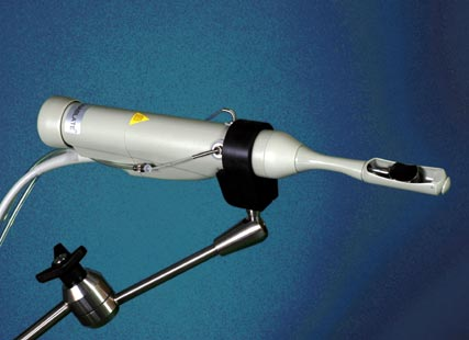 Датчик прибора Sonablate [1]